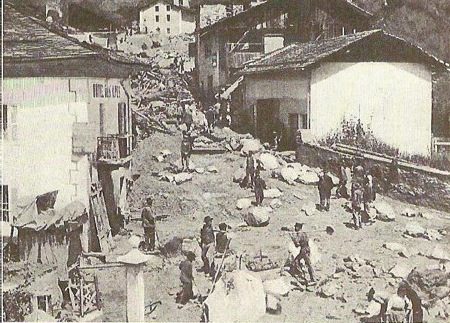 Bozel dévasté suite à la crue du Doron de Bozel - Le 16 juillet 1904